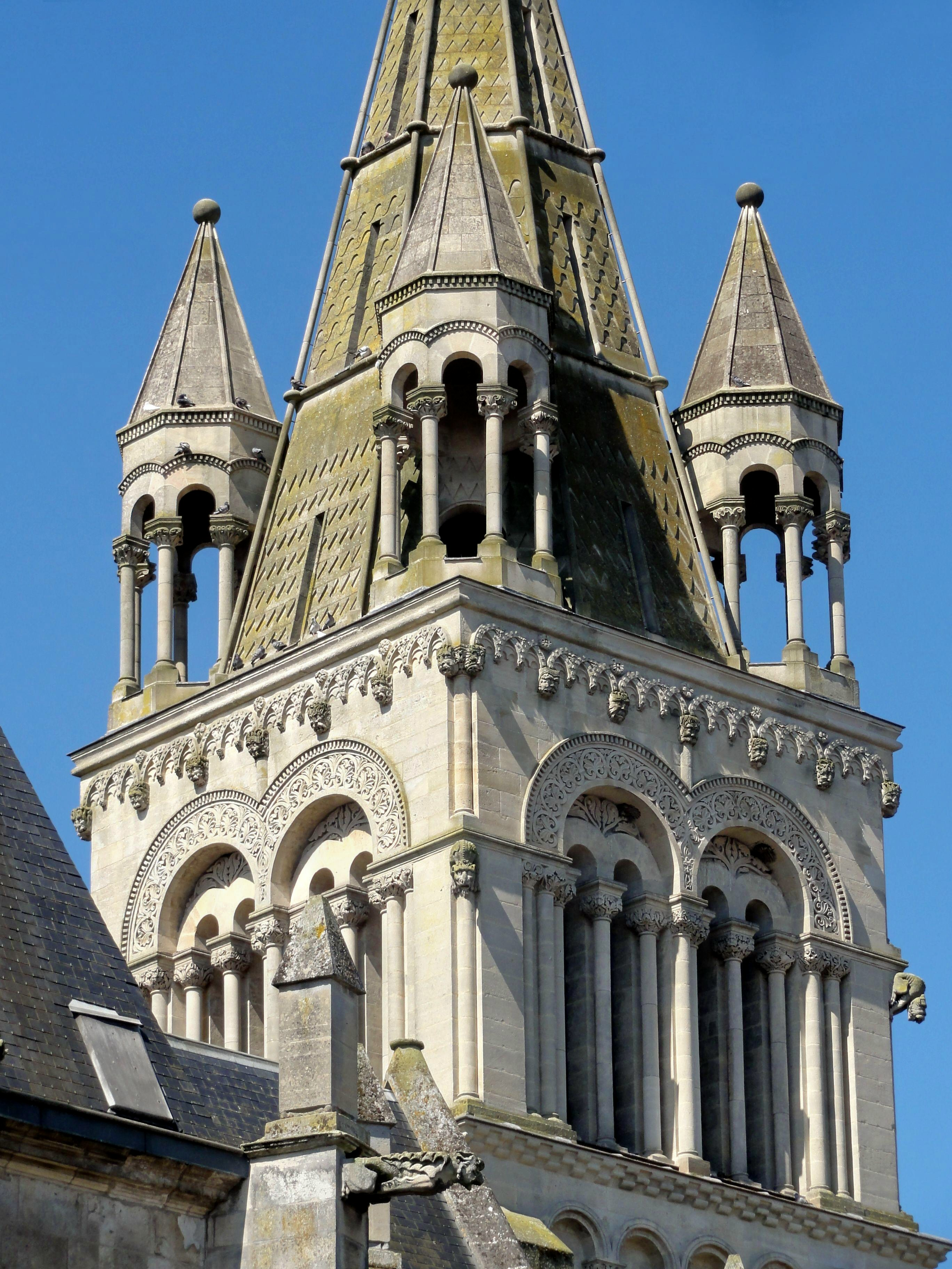 Clocher, détail.